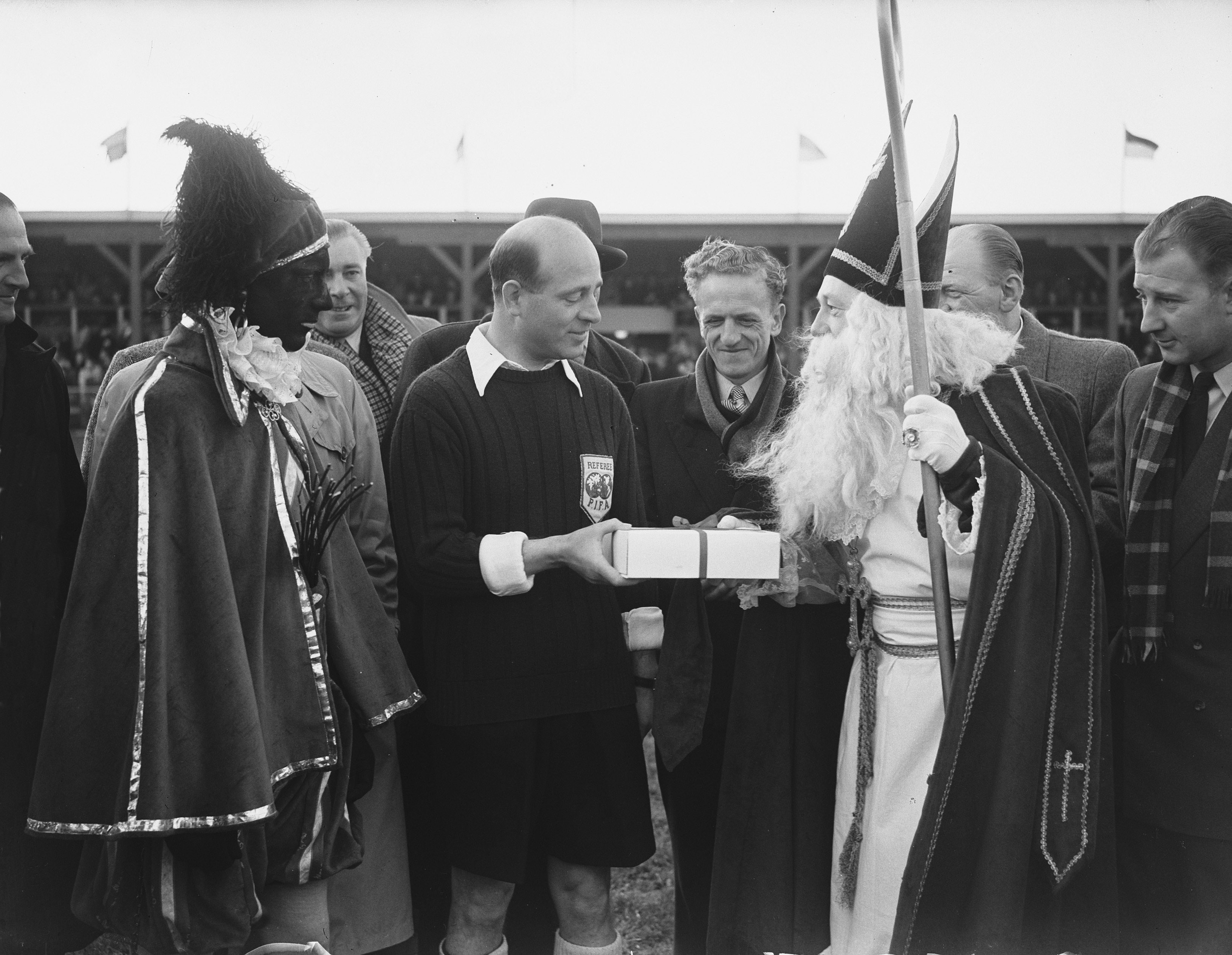 DWS tegen Go Ahead 2-1. Sint Nicolaas met scheidsrechter Karel van der Meer NL-HaNA 2.24.01.09 0 904-8709